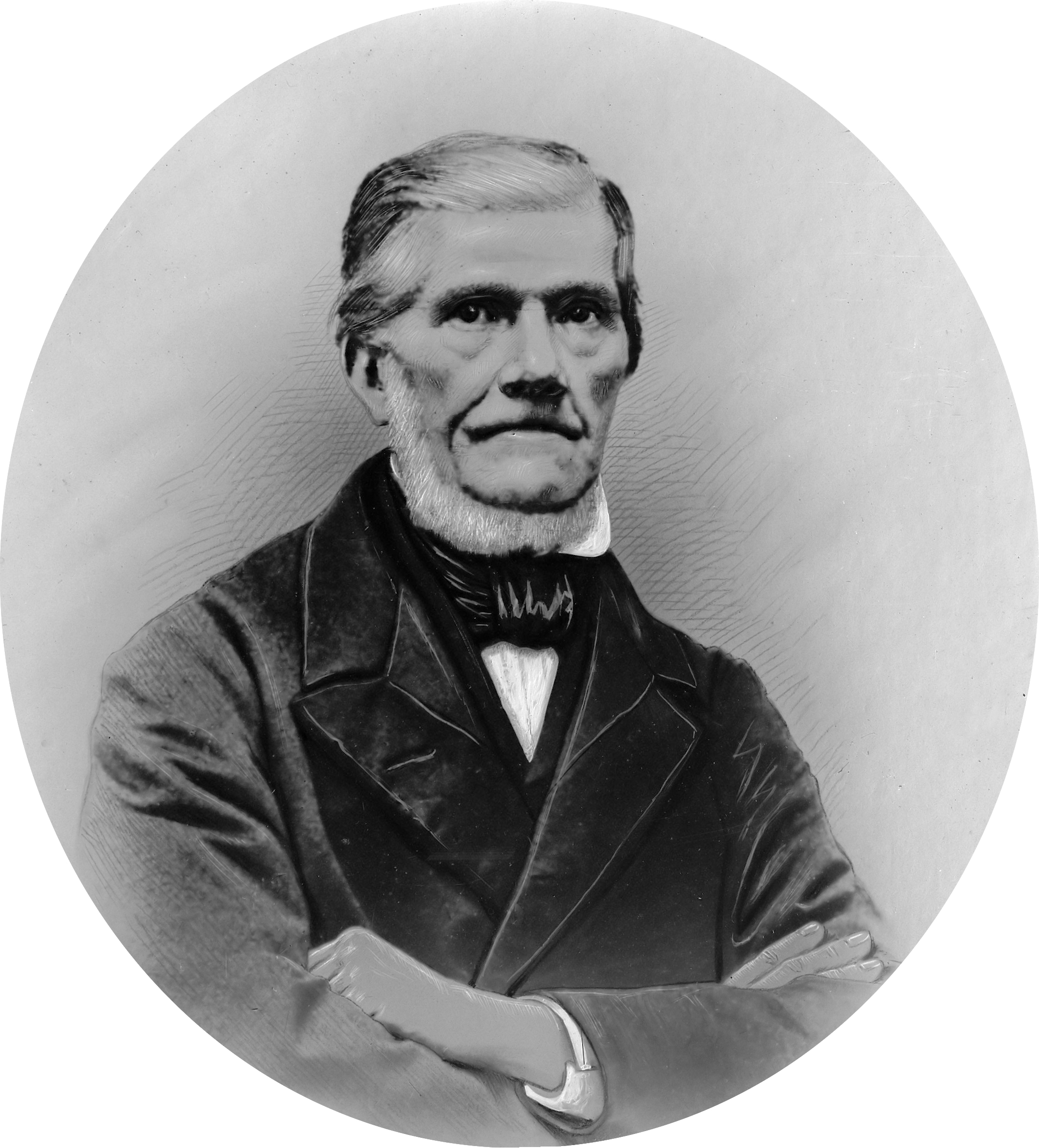 Tekening van Coenraad Johannes van Houten 1910